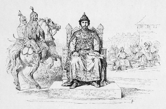 Великий Князь Ярослав Ярославич. 1263-1272 г.В угождении монгольским ханам Ярослав Ярославич следовал примерам отца и брата. Ему предоставлено было ханом сбирать дань без посредства харазских откупщиков, и ханские воины разезжали по Руси для общего наблюдения за порядком.